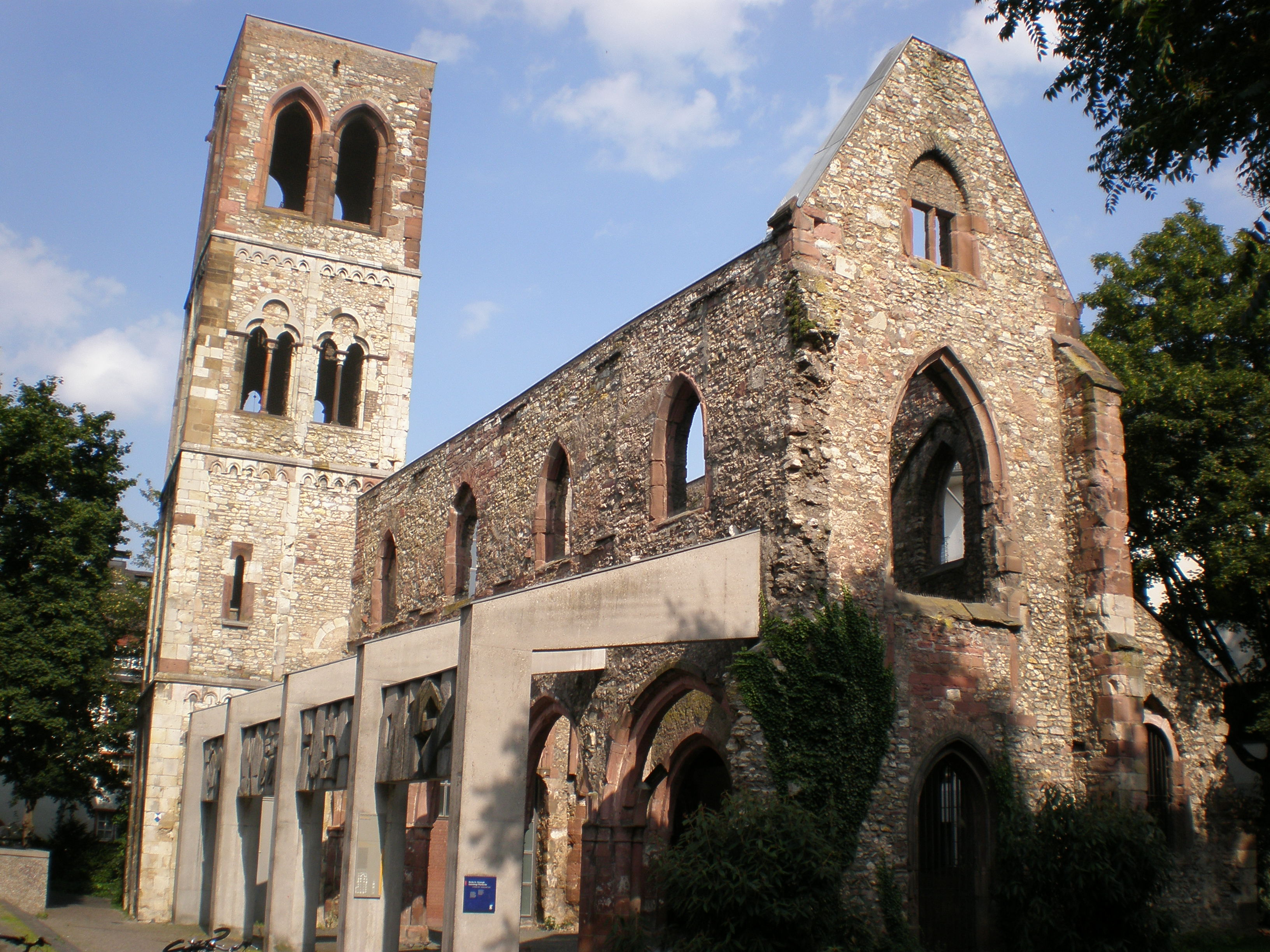 Kriegsdenkmal St. Christoph in Mainz